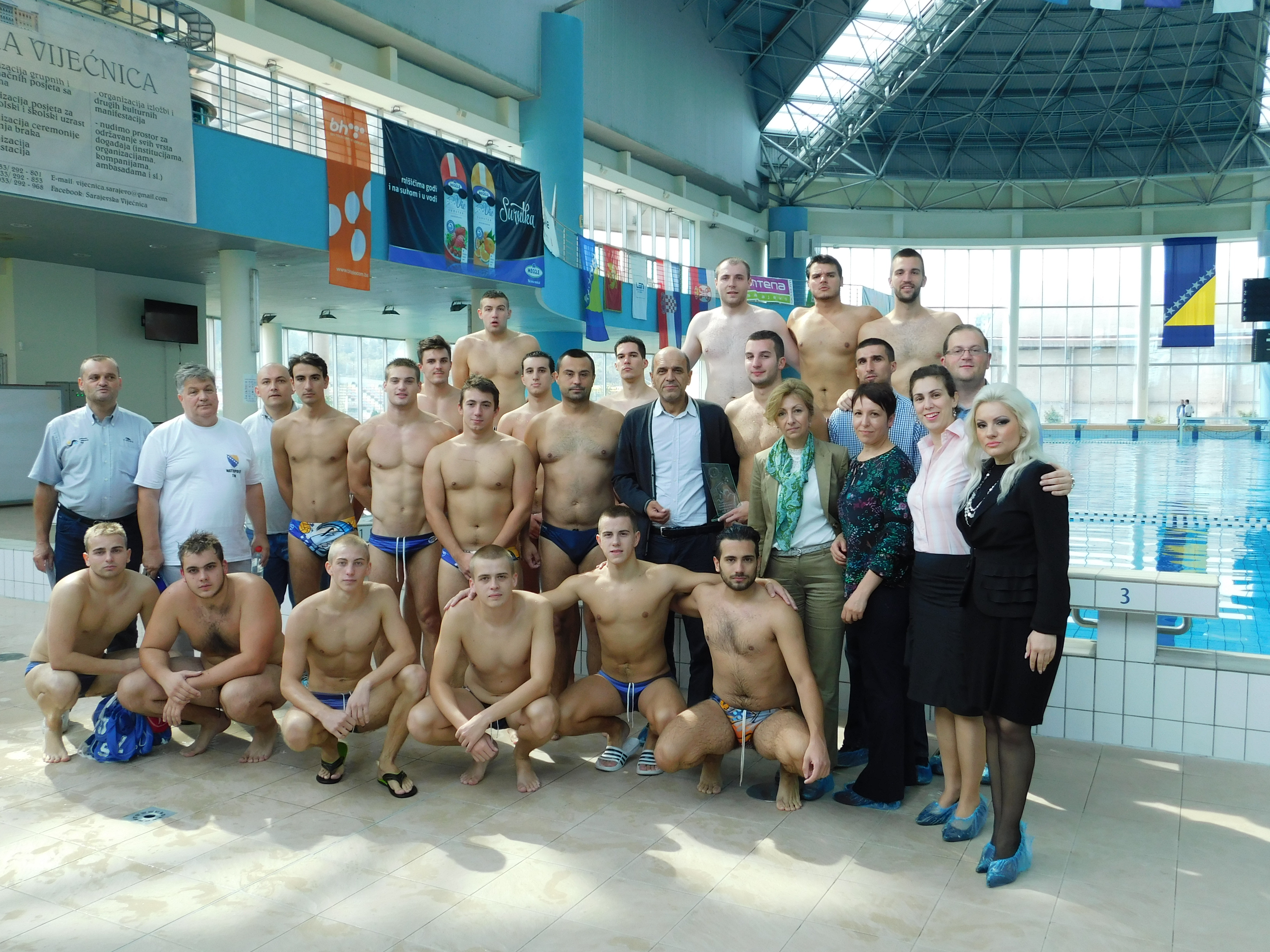 Vaterpolo reprezentacija Bosne i Hercegovine, prva zajednička fotografija vaterpolo tima Bosne i Hercegovine 2016 godine. Pored tima važi istaći da se na slici možemo vidjeti prvi selektor Bosanskohercegovačkog tima Slobodan Grahovaca i prvog kapitena Faris Đugum, također na slici se i nalaze uprava i uposlenici JP „Olimpijski bazen Otoka“.